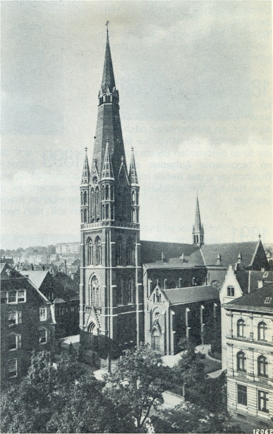 Sankt Antonius in Wuppertal-Barmen, dritte Kirche von 1869-83